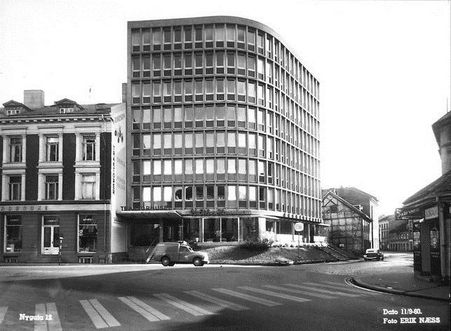 Nygata 12, "Traktorhuset" oppført 1954, fotografert 1960. I dag hjørnet på Oslo City. Karl XIIs gate til høyre i bildet.